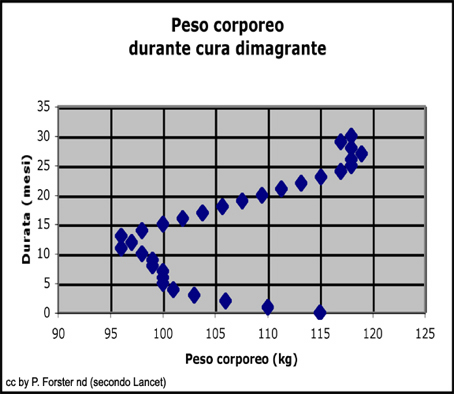 Grafica: Medicina: Dietetica: Peso corporeo durante cura dimagrante: cura dimagrante, Lancet, durata cura, peso corporeo umano